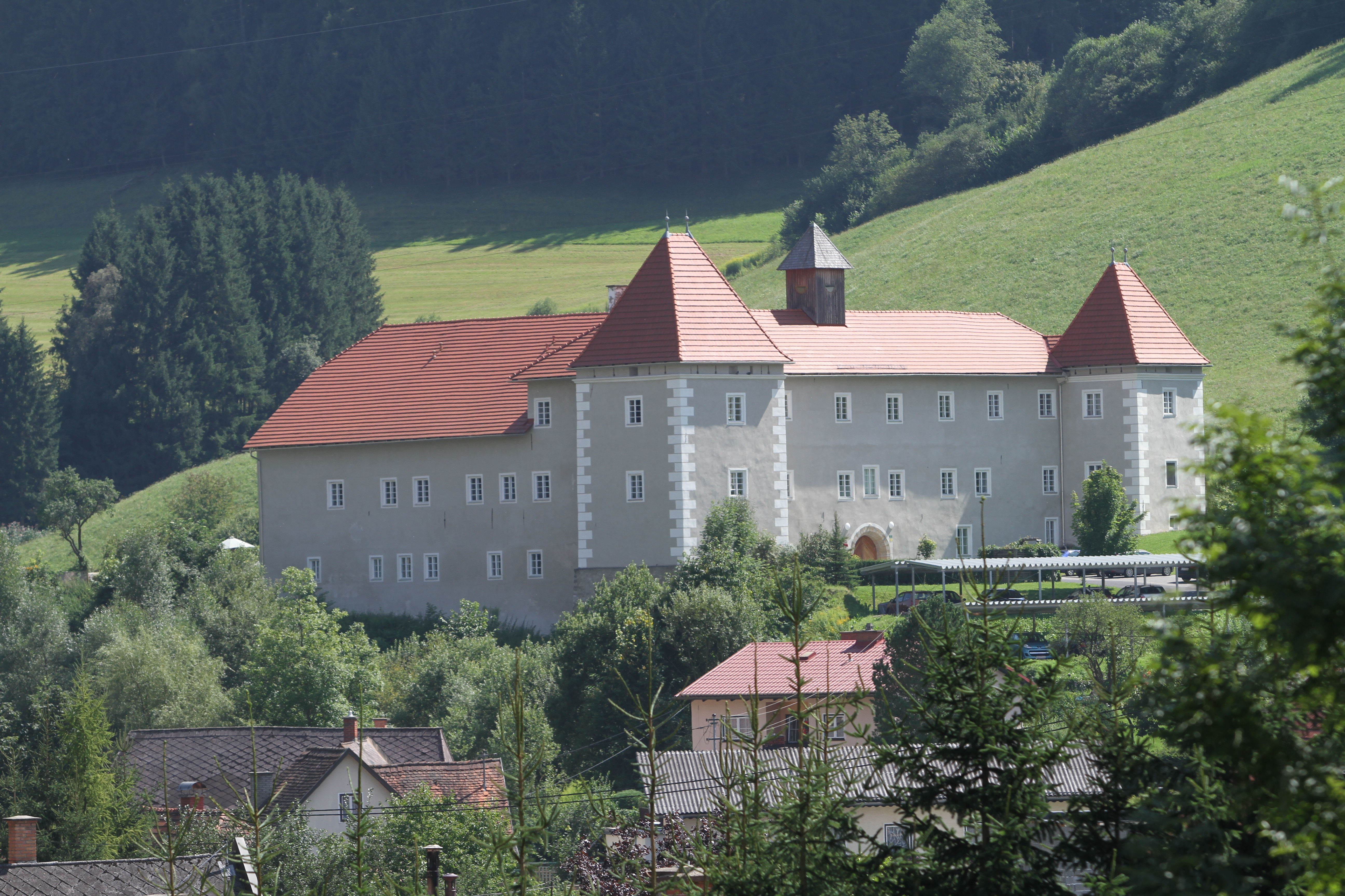 Schloss Weyer mit Umfassungsmauer